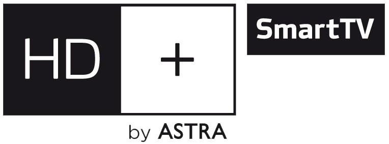 Logo des HD+ Ablegers Smart TV